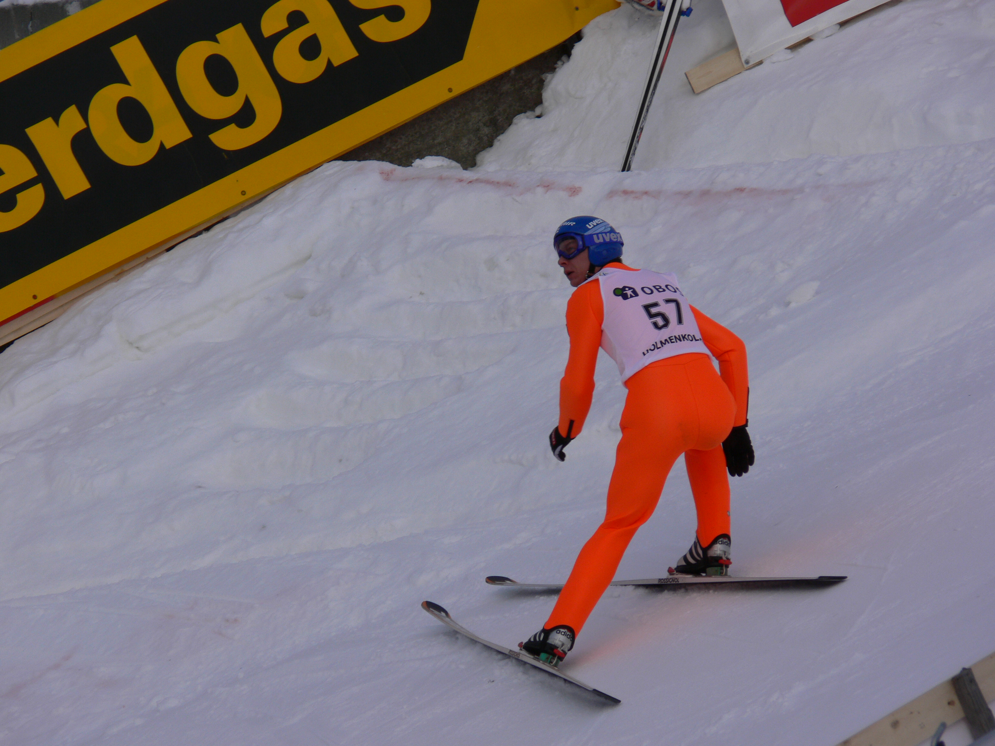 Risto Jussilainen, from Holmenkollen WC event 2006.